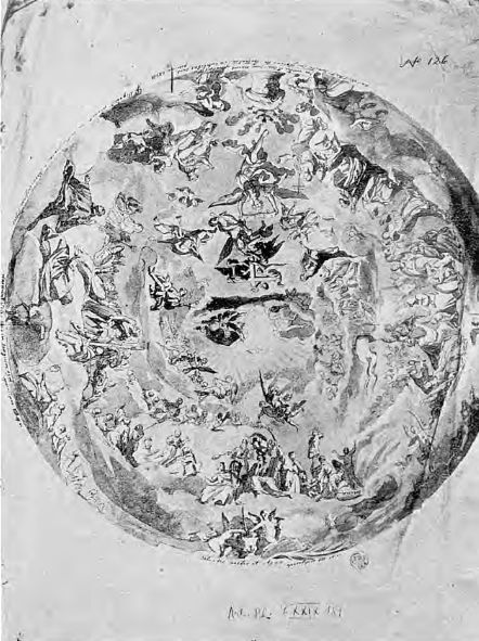 Copie a plafonului bisericii din Val de Grâce de Pierre Mignard - Academia Română